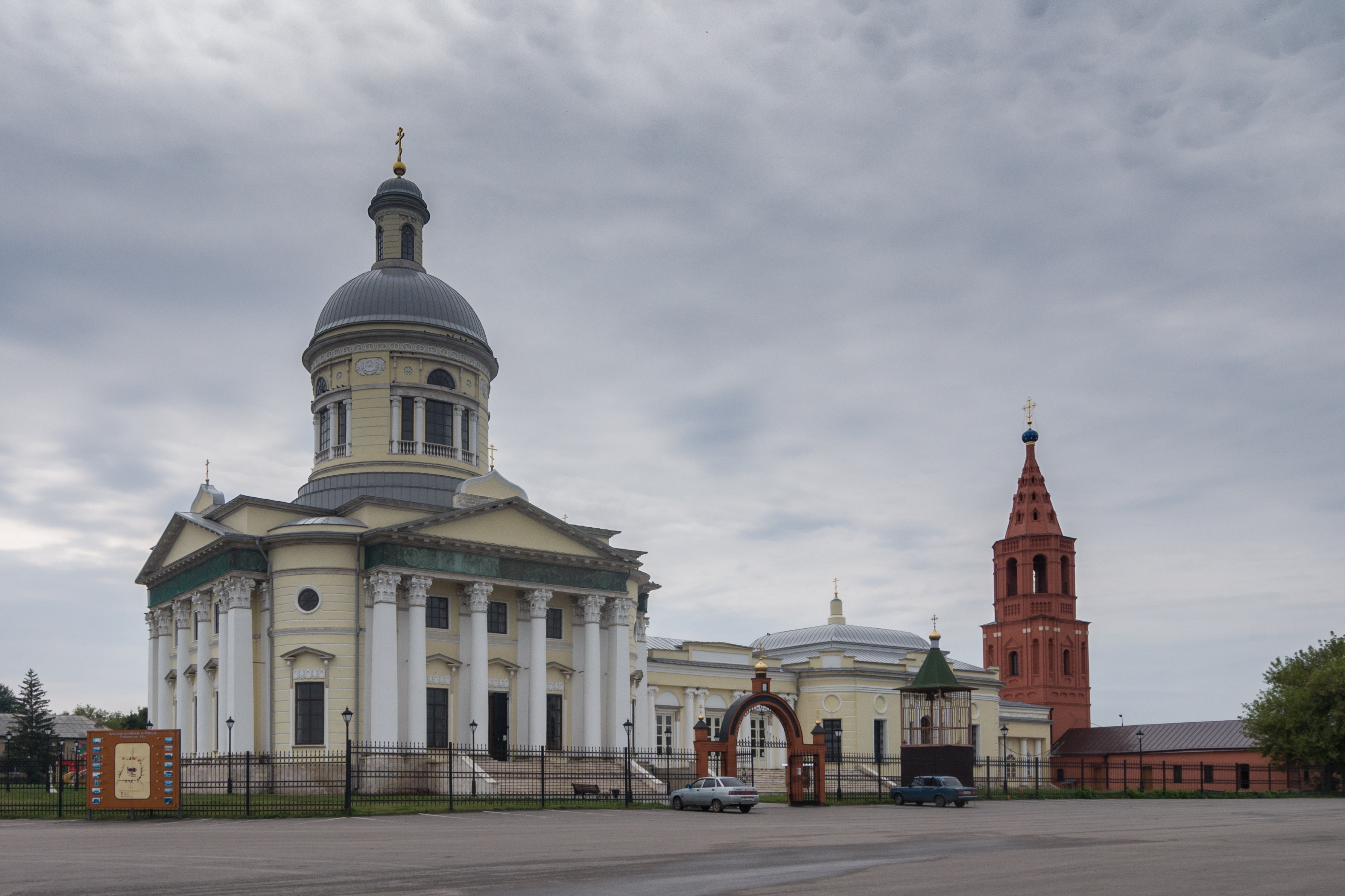 Собор Никольский: площадь Красная, Епифань, Кимовский район, Тульская область